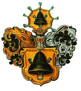 Grb Slovenske krajine (marke)